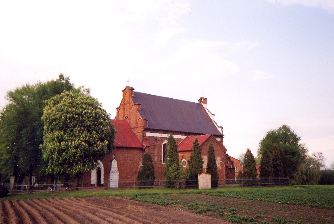 Giżyce - XV wieczny kościół gotycki (zabytek nr rejestr. 277/61)